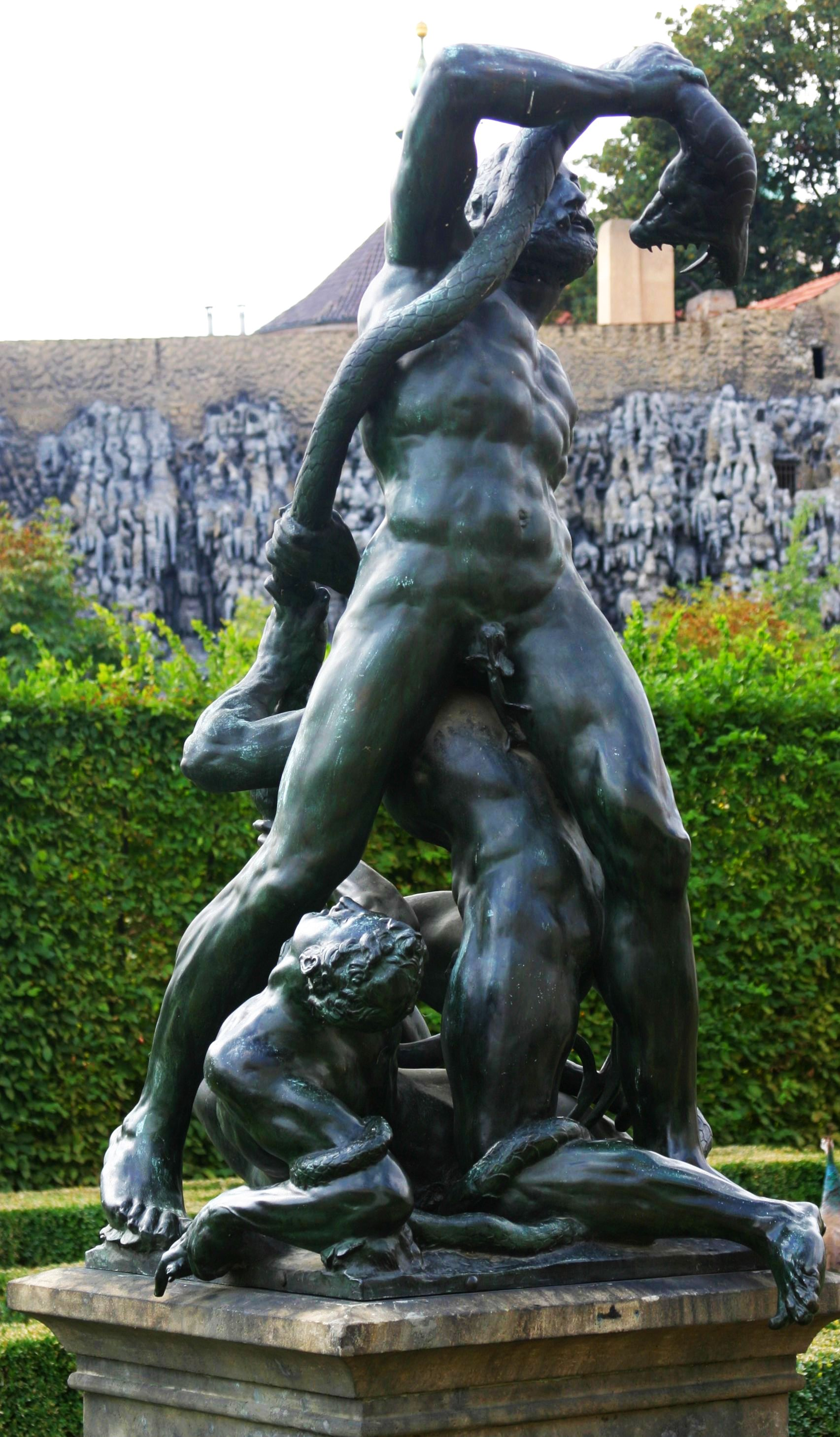 Laokoon a synové.